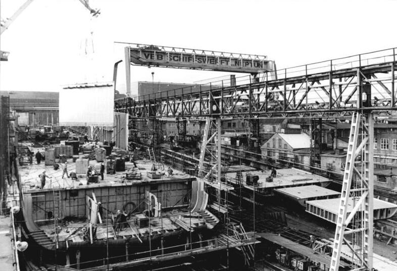 Rostock, Neptunwerft, Trockendock, Helling ADN-ZB Sindermann 24.6.85 Rostock: Integration-Auf den Hellingen der Rostocker Neptunwerft entstehen gegenwärtig moderne Trailerschiffe für die UdSSR mit einer Tragfähigkeit von fast 5000 Tonnen. Die mit einer Heckrampe ausgerüsteten gesetzt werden. Rechts neben dem Trailer entsteht der erste Mehrzweck-Containerfrachter des Types "Äquator-Neptun", dessen Kiellegung kürzlich erfolgt war. -siehe auch 1985-0624-11 und 13N